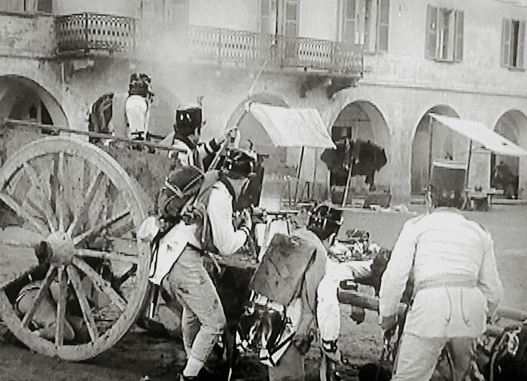 "La pattugli sperduta" (P. Nelli, 1954) - scena del film